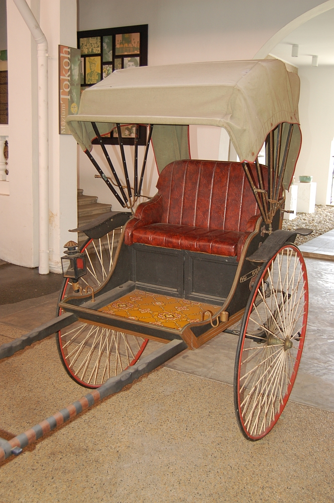 Lanca